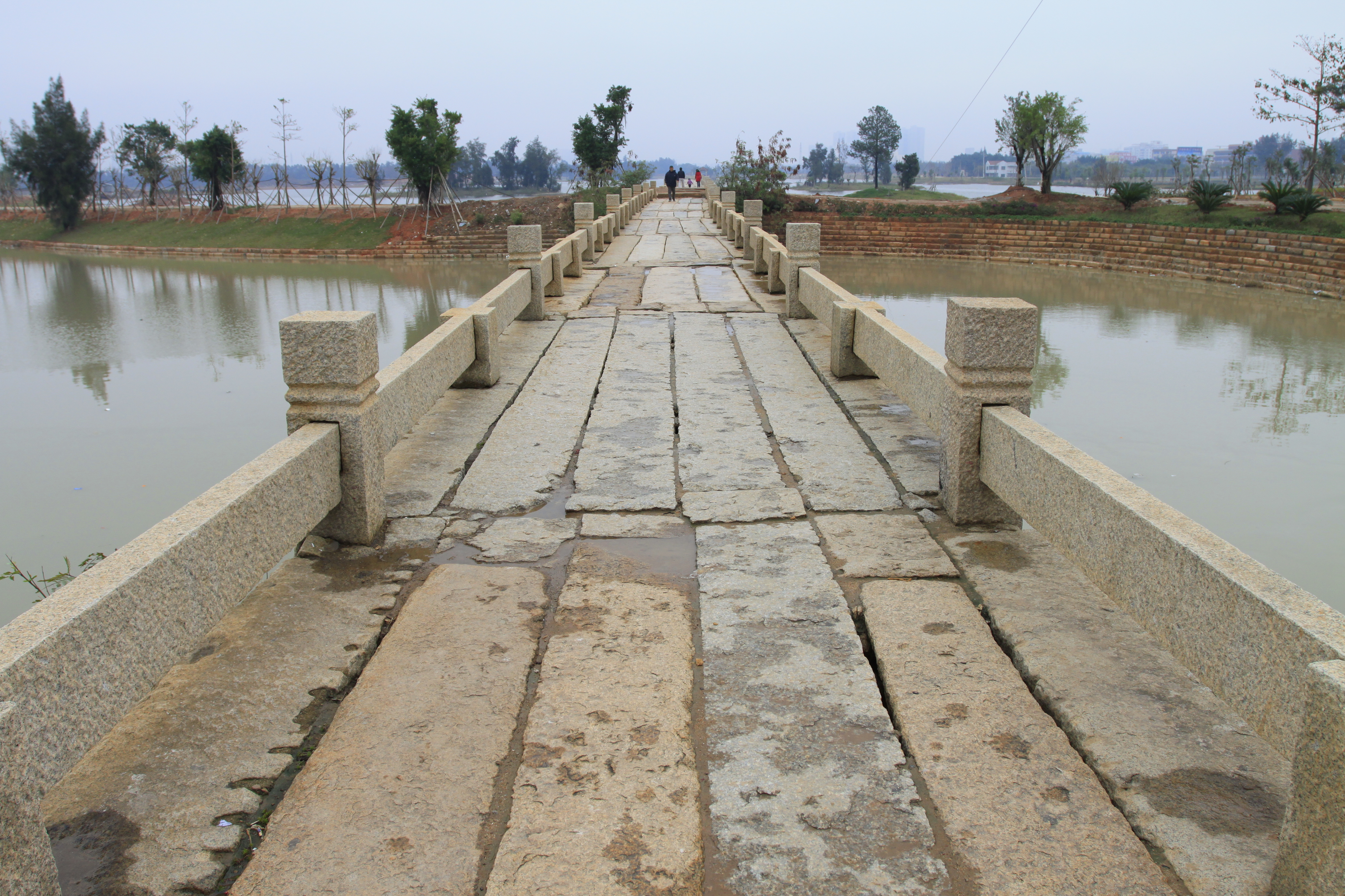 安平桥 西段